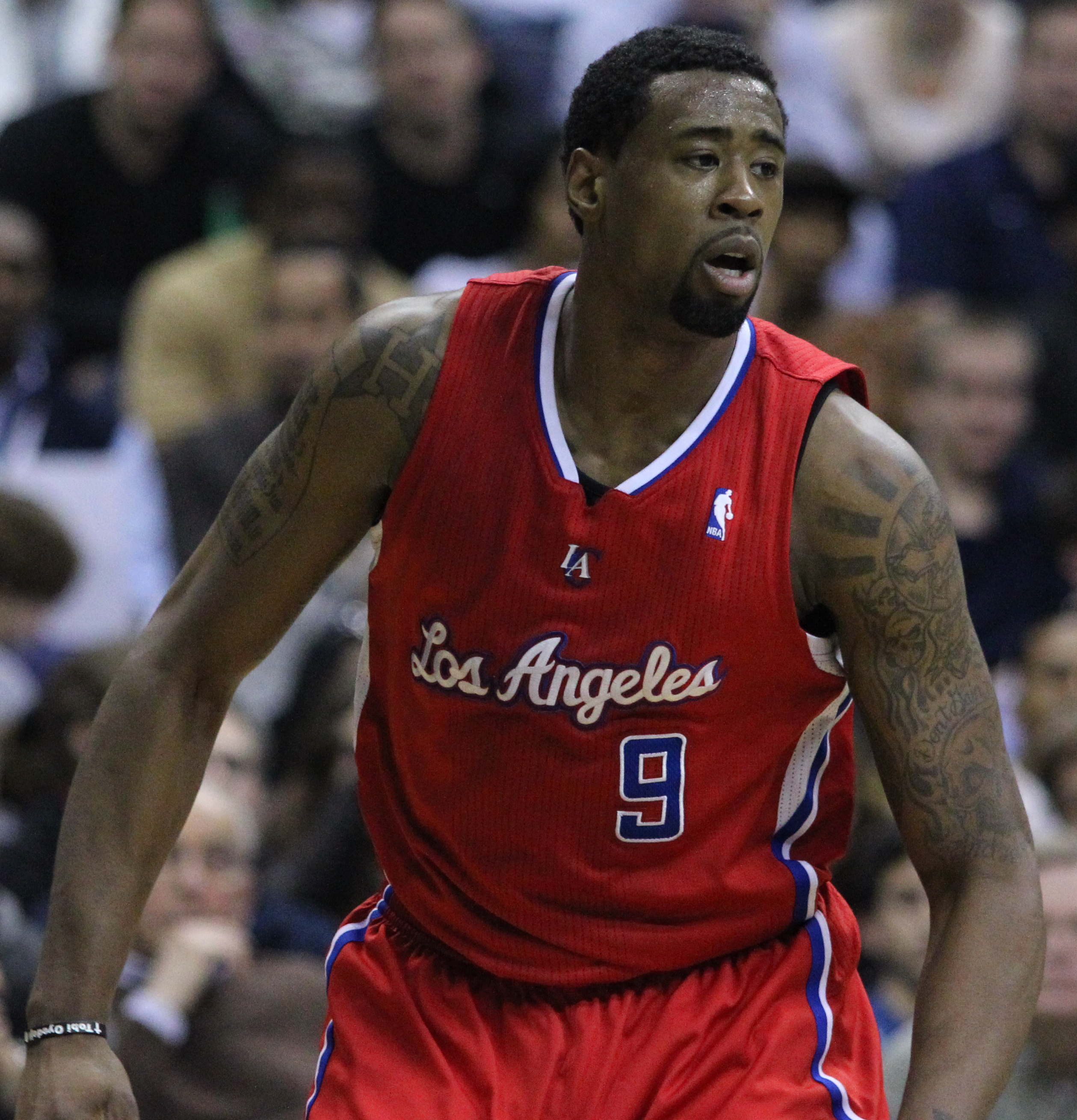 Wizards v/s Clippers 03/12/11